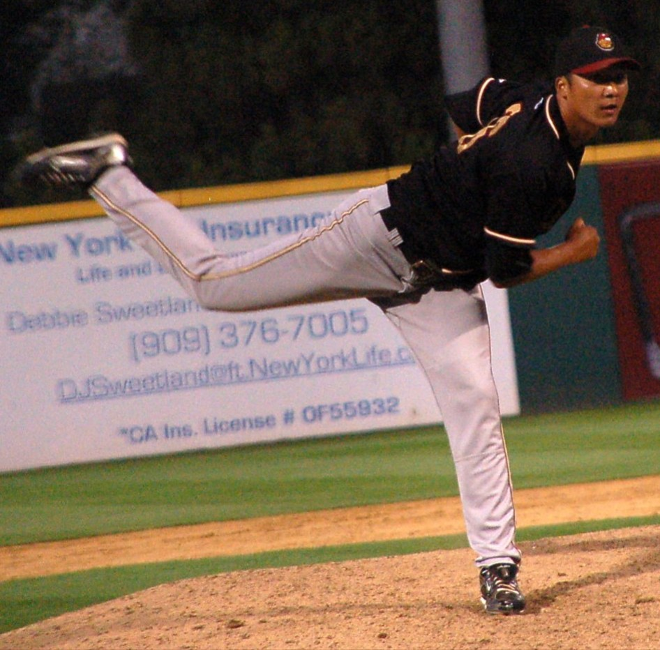 郭勝安於2011年科羅拉多洛磯隊小聯盟高階1A時期。